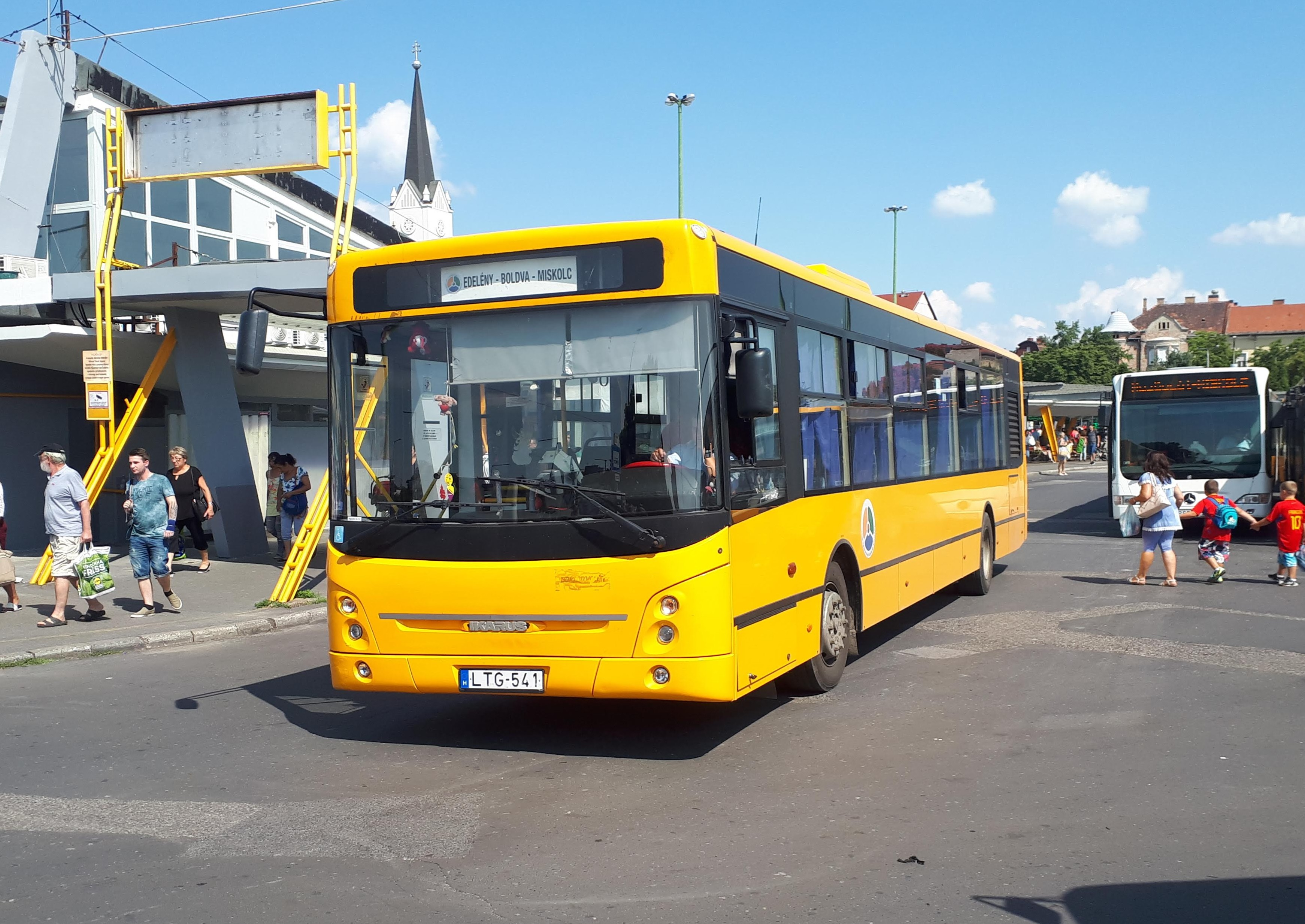 Az ÉMKK LTG-541 rendszámú Ikarus-ARC E127 típusú busza Miskolcon, a 3776-os helyközi járaton.